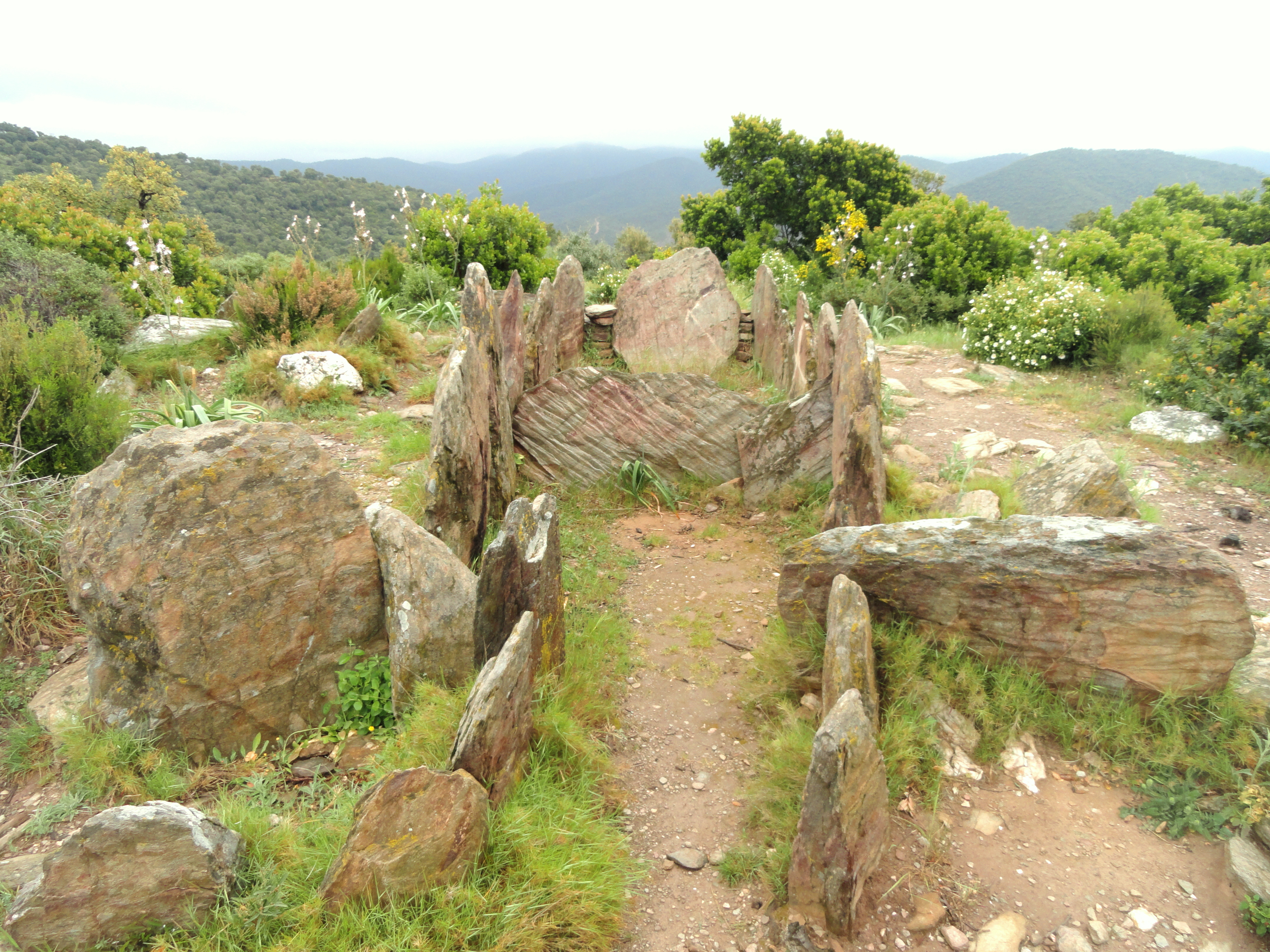 Dolmen de gaoutabry, La Londe-les-Maures, France.